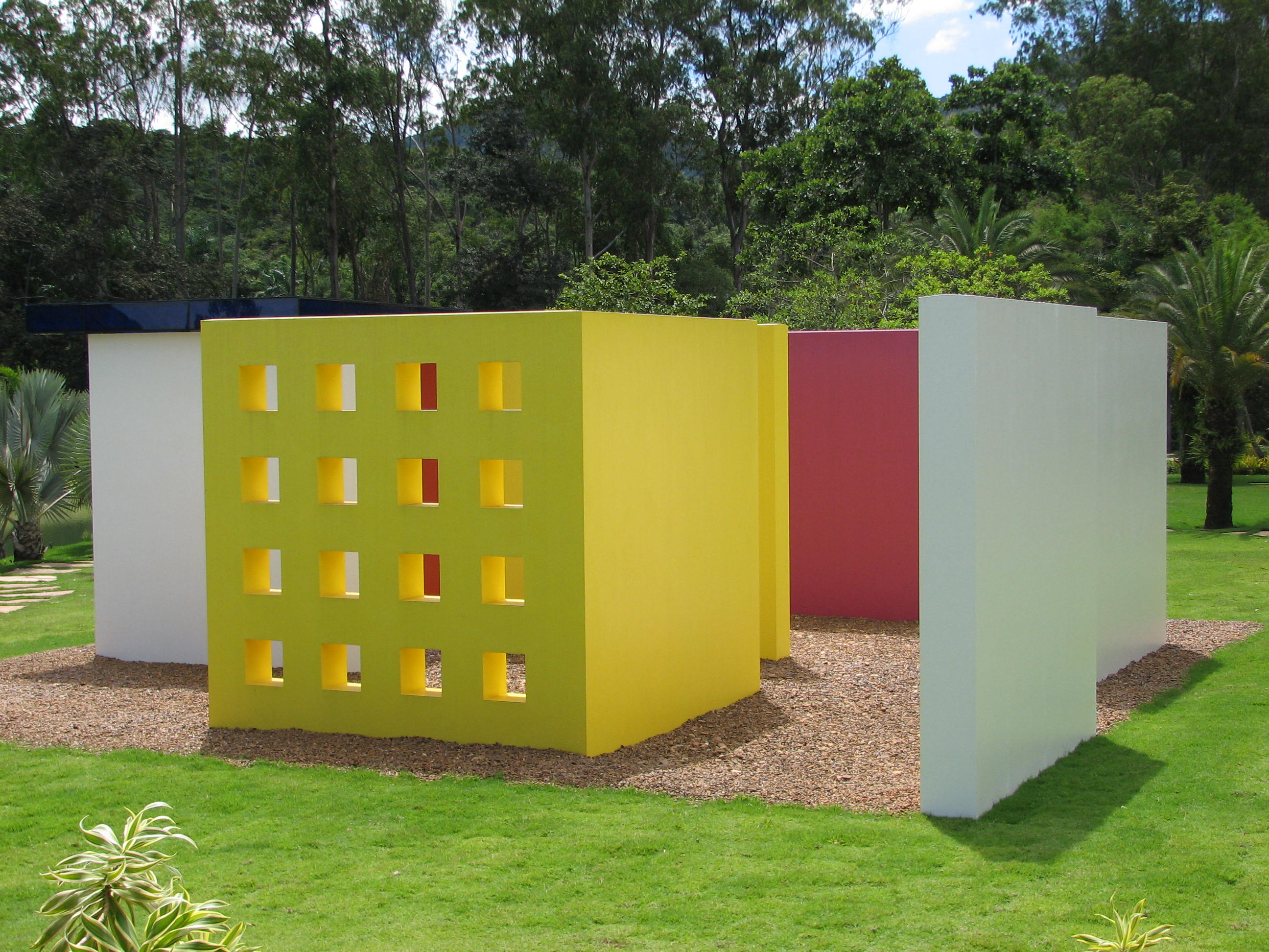 Inhotim in Brumadinho/Brazil